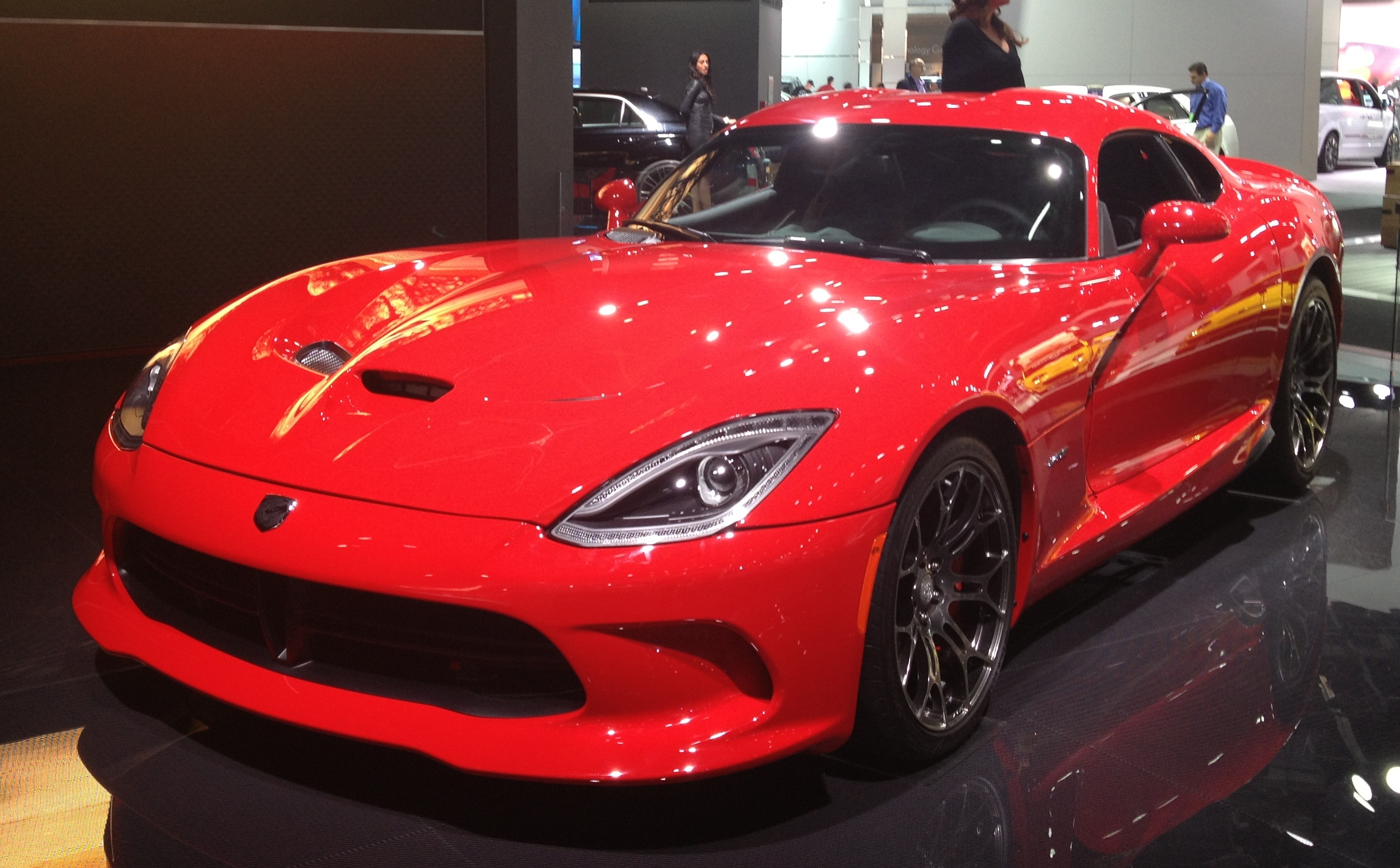 Una SRT Viper GTS rossa